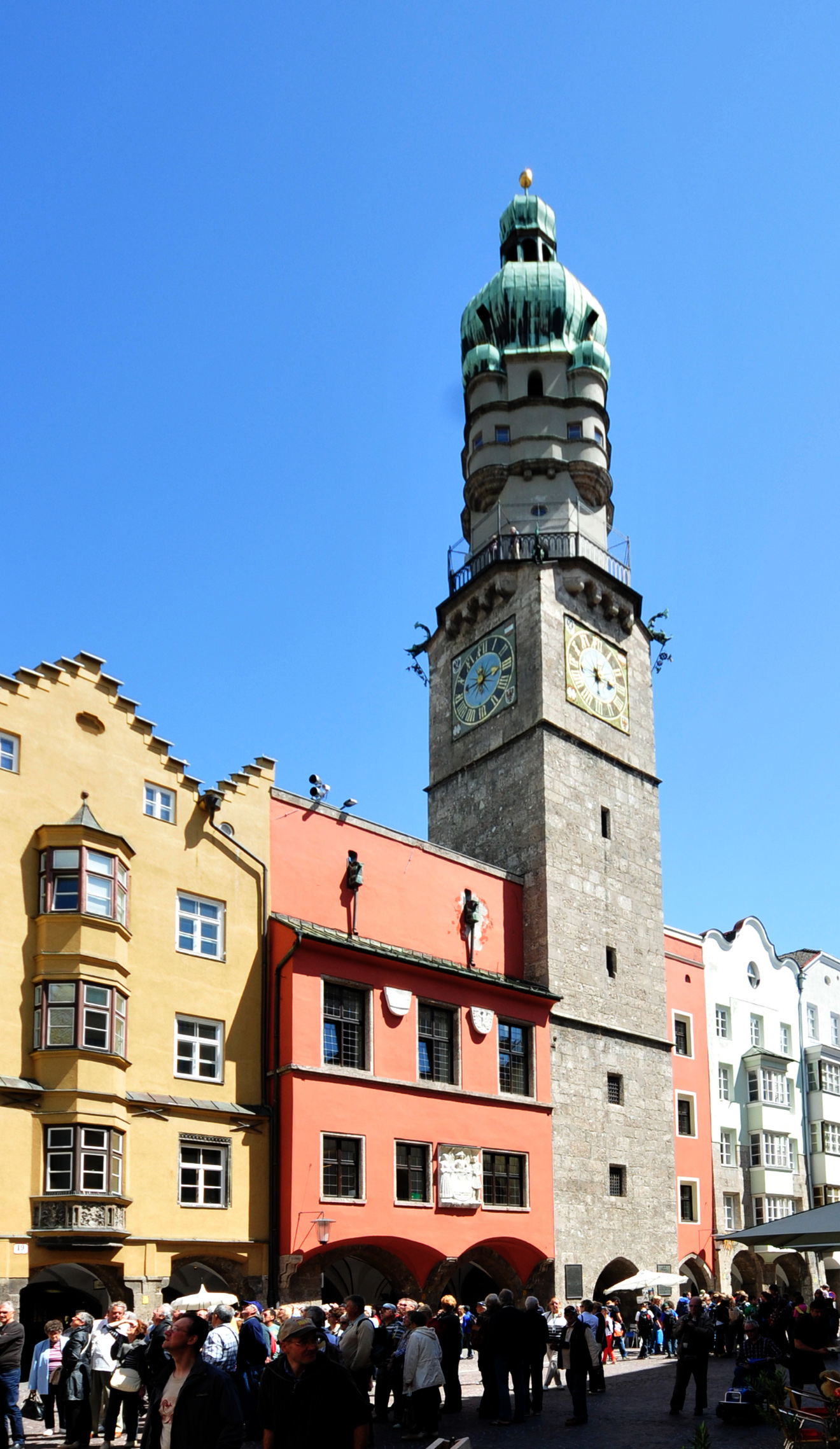 Innsbruck Im Rahmen des Fußballländerspiels Österreich gegen Rumänien bin ich einige Stunden durch Innsbruck gefahren und habe Aufnahmen gemacht, die vielleicht mal gebraucht werden könnten. --Ralf Roleček 11:20, 10 June 2012 (UTC) The making of this work was supported by Wikimedia Austria. For other files made with the support of Wikimedia Austria, please see the category Supported by Wikimedia Österreich.